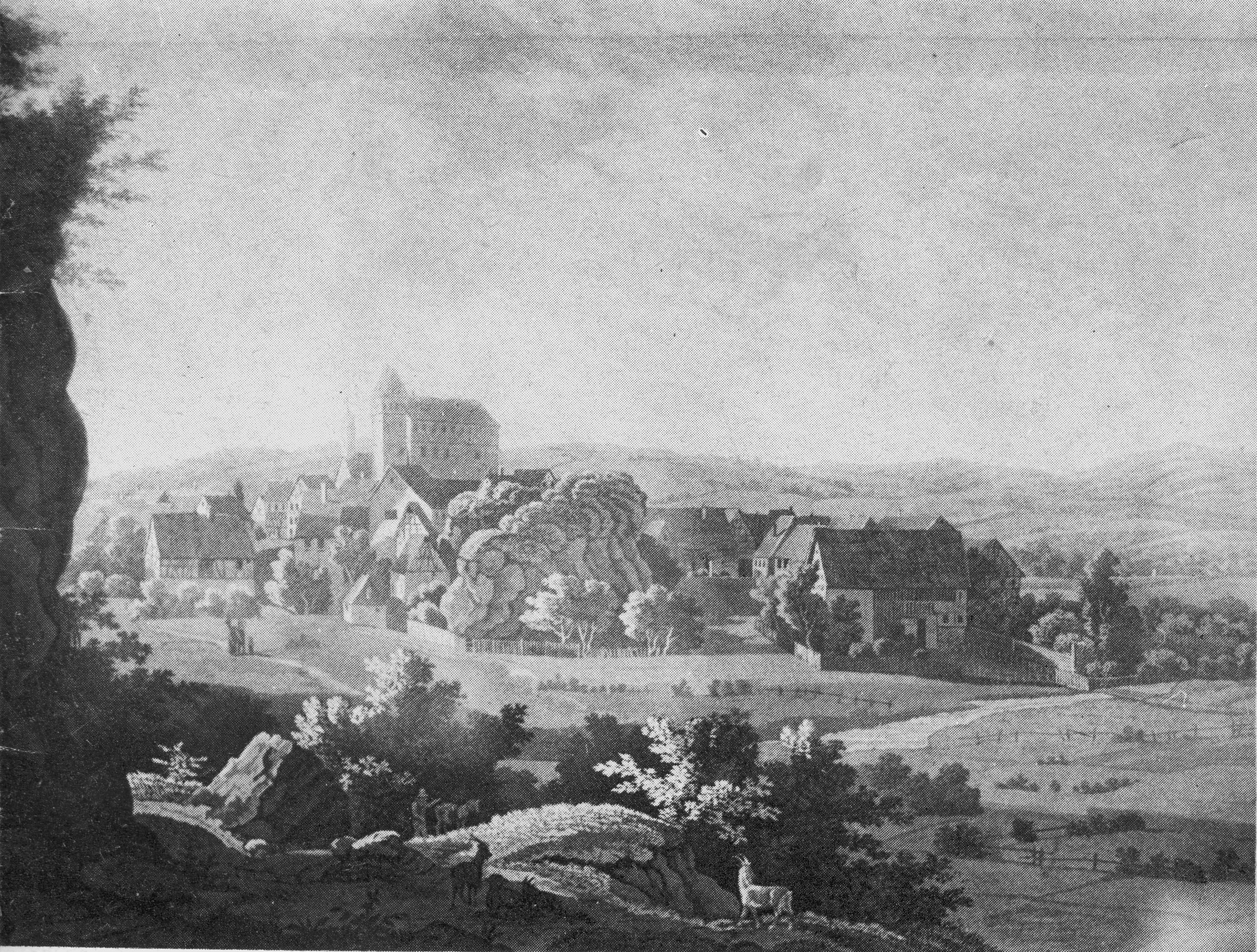 Jungnau Ortsansicht um 1834